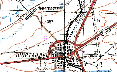 Село Новографское на карте 1985 г.